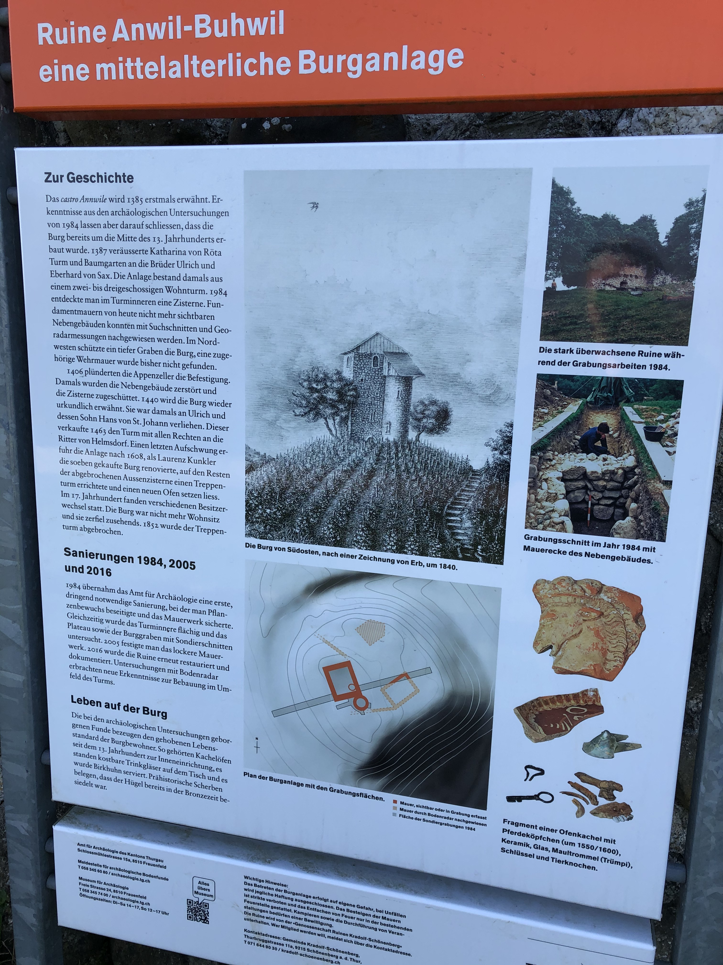 Geschichtliche Informationen zur Burganlage Anwil-Buhwil im Kanton Thurgau